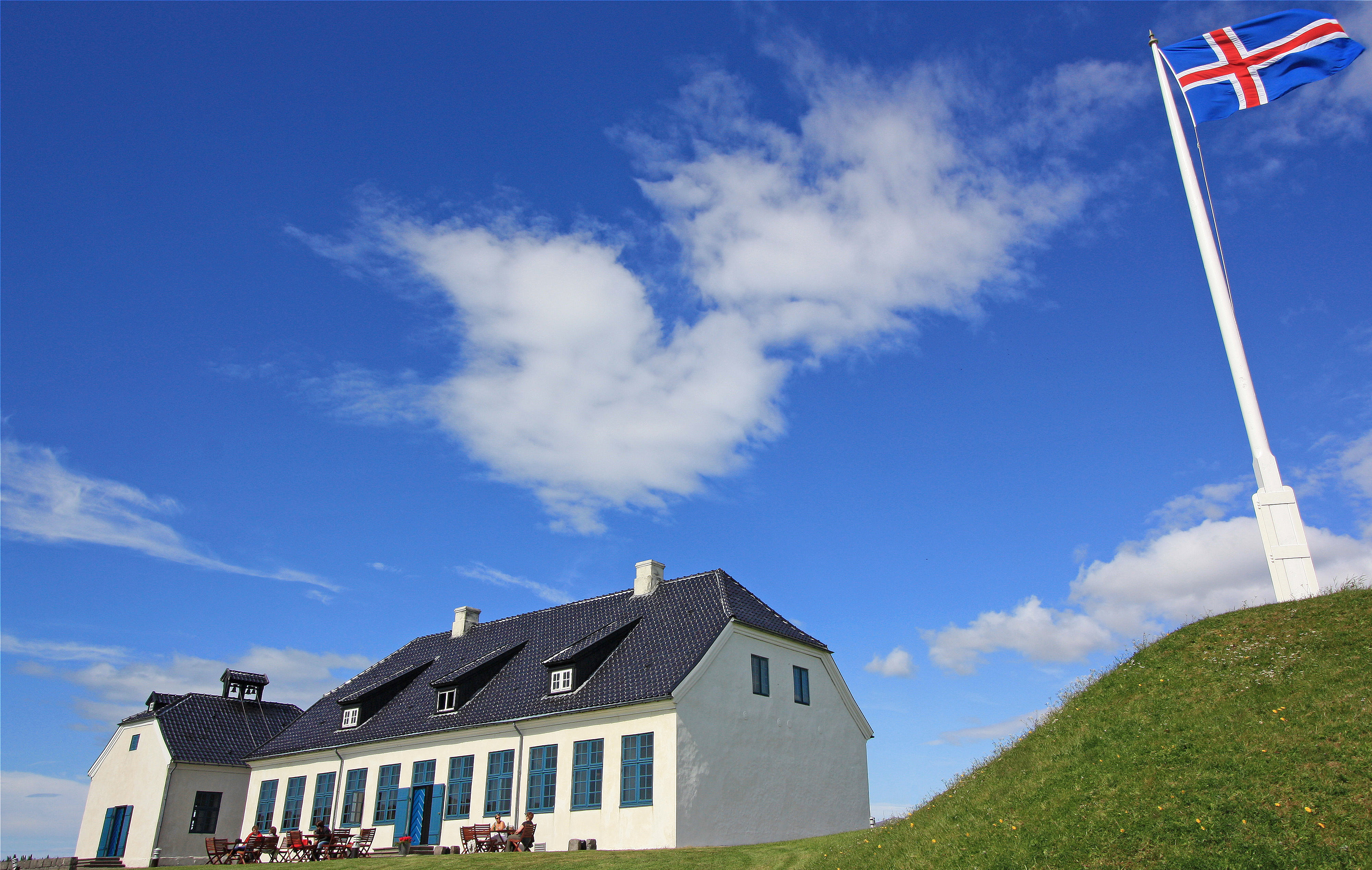 Viðeyjarstofa er eitt elsta hús landsins og fyrsta stein-húsið sem reist var á Íslandi. Var hún byggð á árunum 1752-1755 sem embættisbústaður Skúla Magnússonar nýskipaðs landfógeta. Kostaði Danakonungur framkvæmdina og hirðarkitekt hans, Nicolai Eigtved, teiknaði húsið í rókókóstíl. Stofan var bústaður valdamestu manna landsins um margra áratuga skeið. Má þar m.a nefna Ólaf Stephensen, fyrsta íslenska stiftamtamanninn og son hans Magnús Stephensen konferensráð og dómstjóra.